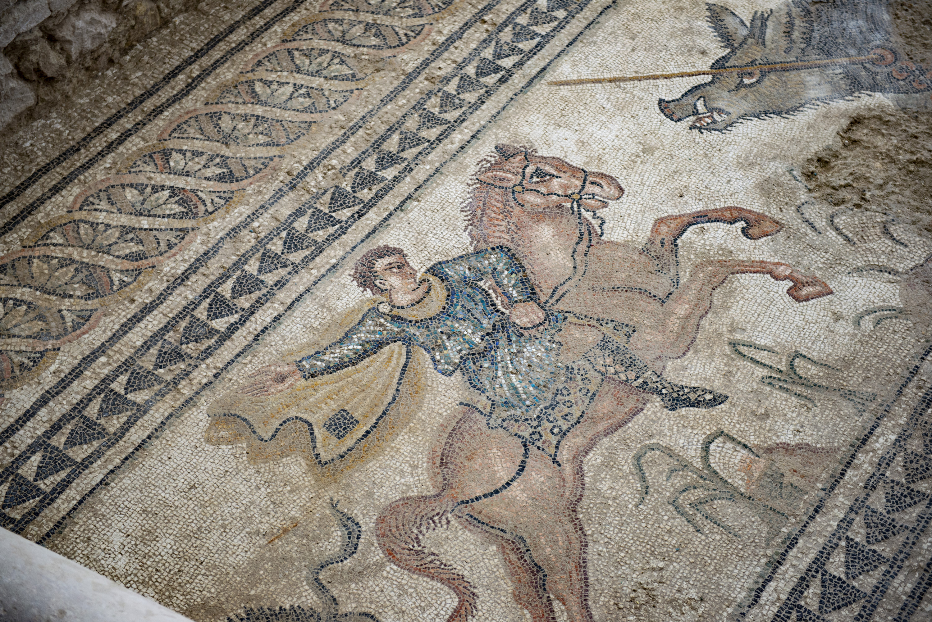 Fotos: J.M. Grimaldi / Junta de Andalucía Ancient Roman villa of Salar, Granada, Spain.